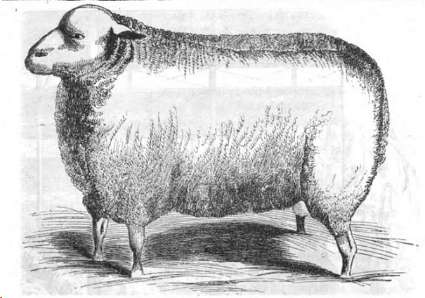 Leicester Schur-Widder des Herrn Stone, 40 Monate alt, erhielt den ebenfalls 30 Pfd. Sterl.